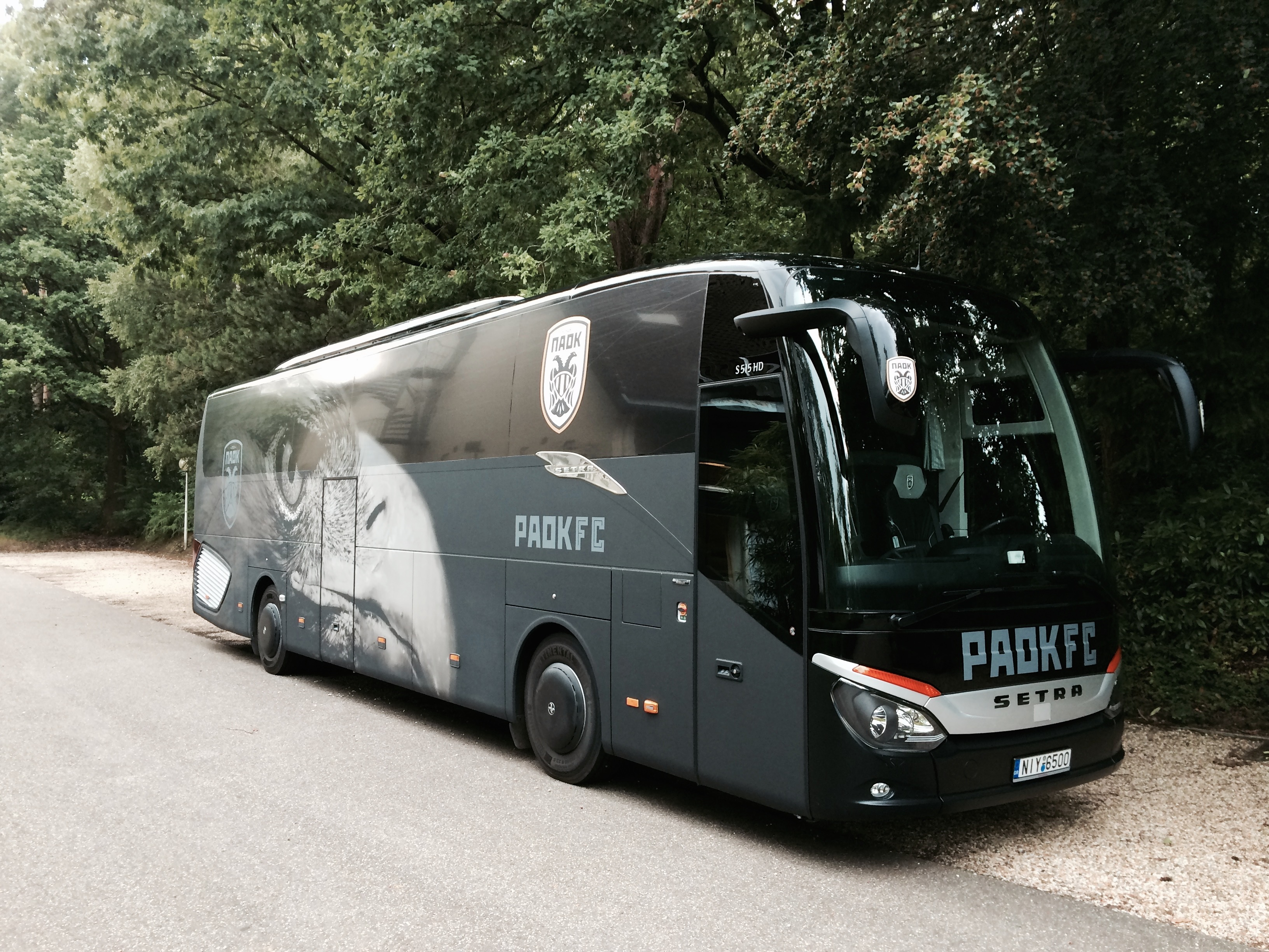 Der Mannschaftsbus von PAOK F.C mit neuen Emblem